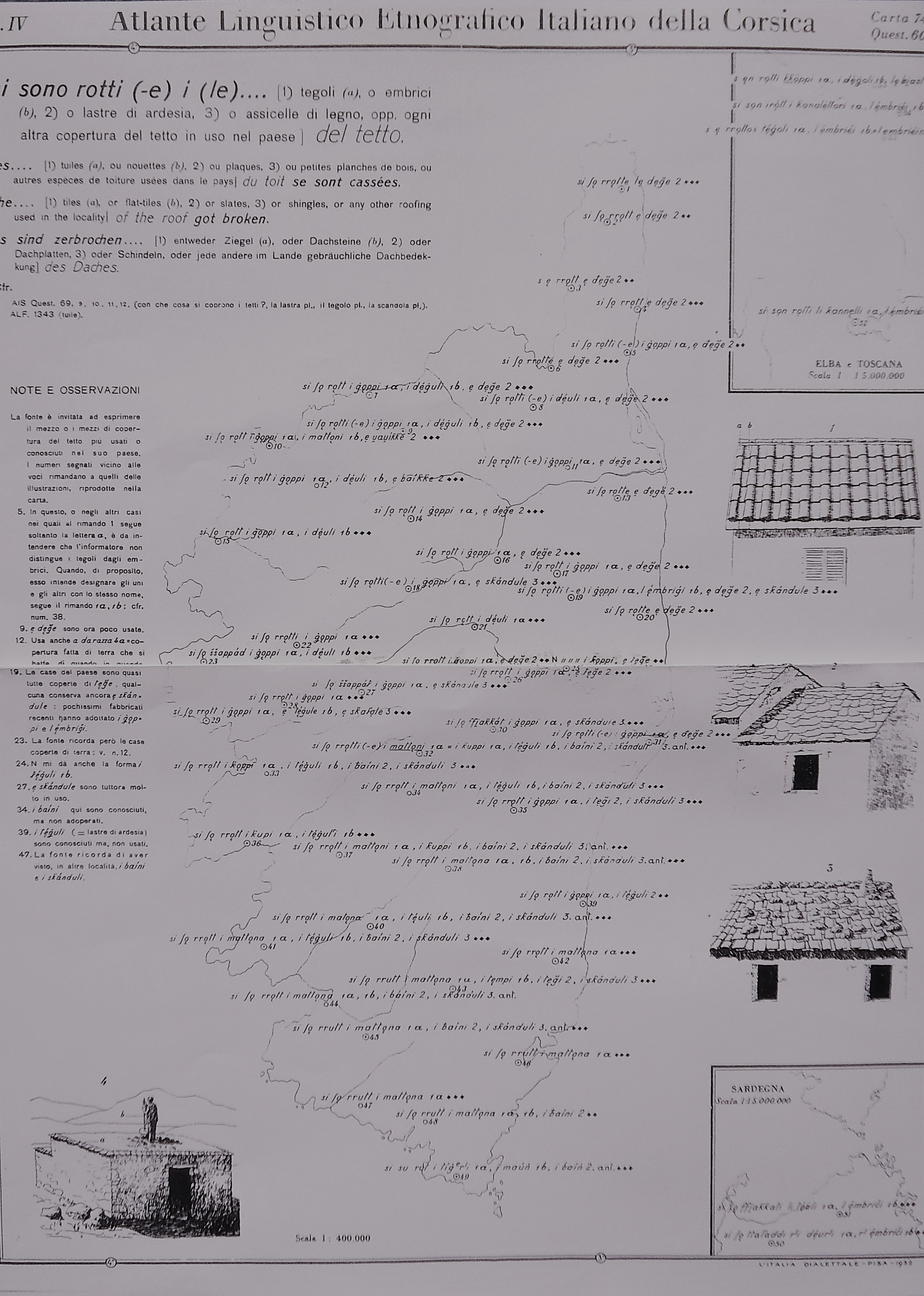 Opera in 10 volumi in-folio, per complessive 2001 carte piegate, pubblicata nel 1933 (+ Indice cm. 28, pubblicato nel 1942). Questa immagine fu inserita nel volume di presentazione, del 1932. Sul profilo della Corsica, del nord della Sardegna e di parte delle coste toscane sono segnate le varietà linguistiche locali. La frase in italiano del questionario di questa tavola è: si sono rotti (e) i (le) tegoli (e) o embrici.